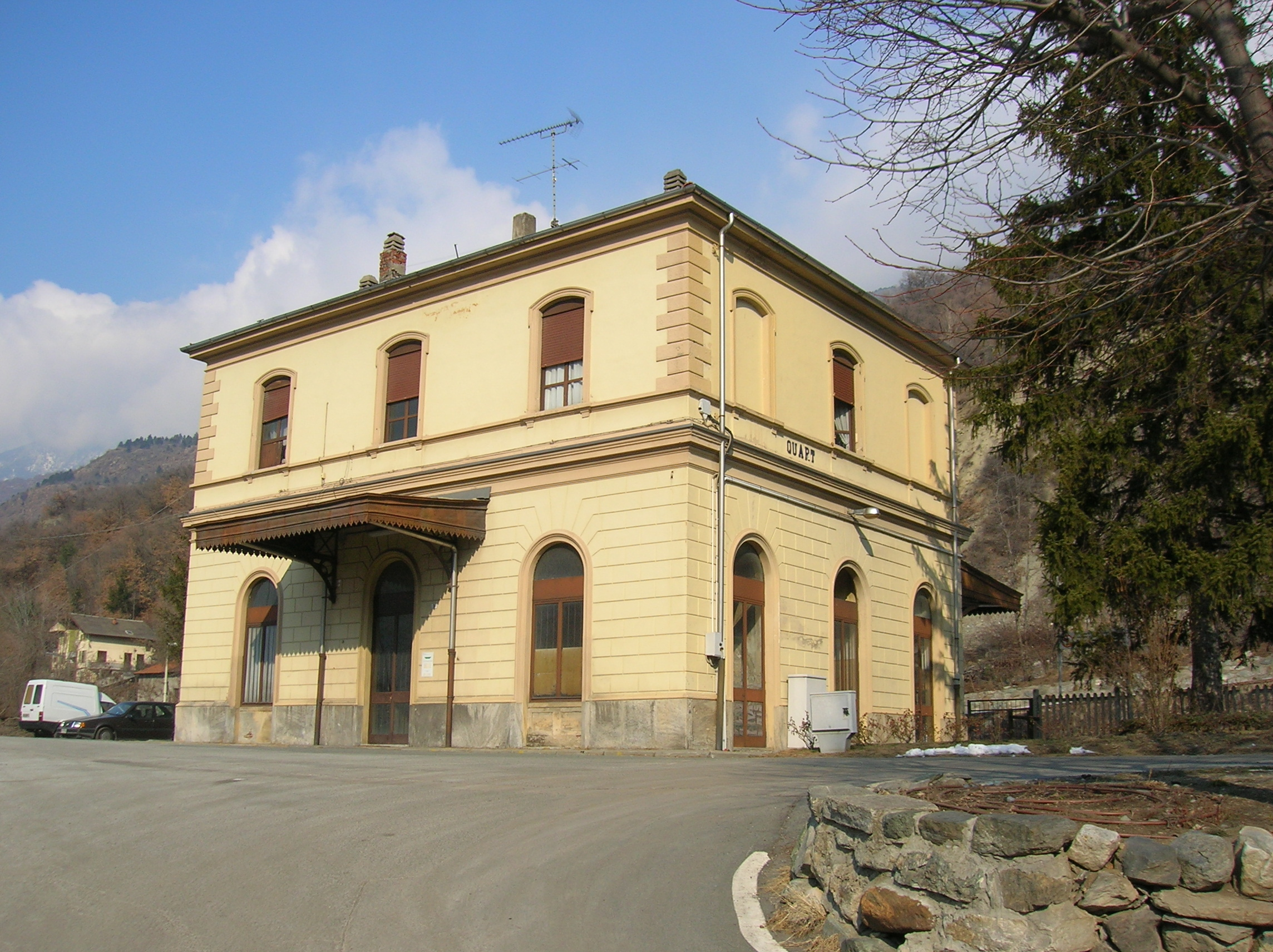 Stazione di Quart (Valle d'Aosta, Italia) in località Villefranche.